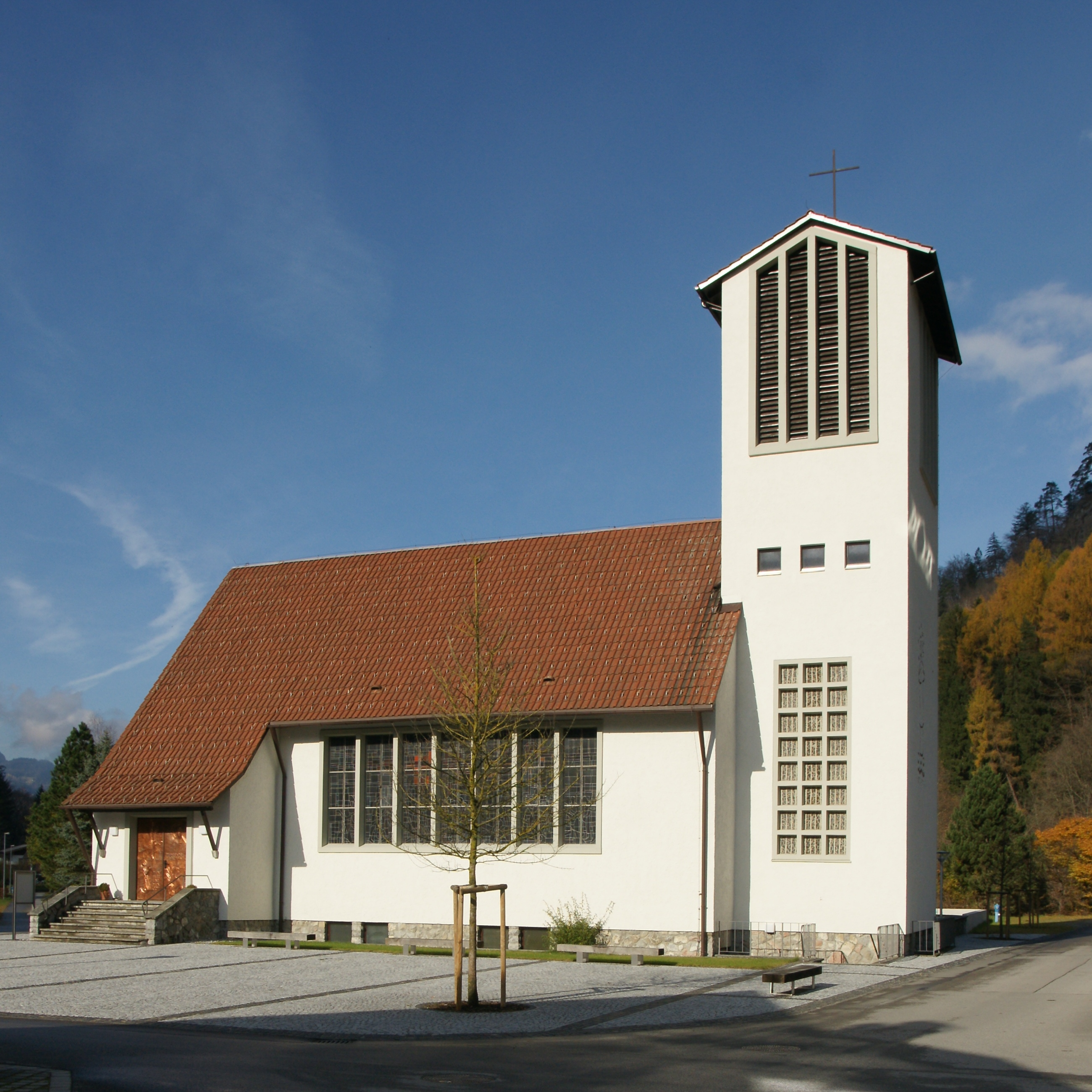 Kirche hl. Johann Nepomuk von Lorüns in Vorarlberg.